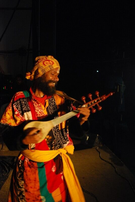 Tharundas baul, baul singer performing at Kollam